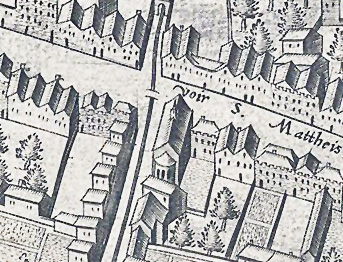 Ausschnitt des Mercator – Stadtplanes Köln. Bereich „St. Mathias“